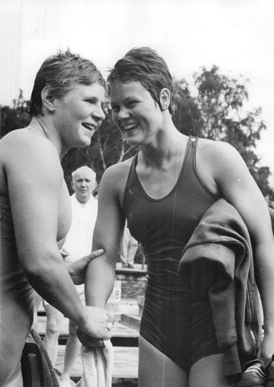 Petra Noack, Heidi Pechstein Zentralbild Kohls 16.7.1962 Heidi Pechstein schwamm deutschen Rekord Keine 24 Stunden alt wurde der deutsche Rekord, den Harriet Blank (SC Rotation Leipzig) am 15.7.1962 beim Schwimm-Länderkampf gegen Ungarn über 400 m Lagen in 5:42,2 min. aufgestellt hatte. Bei Überprüfungswettkämpfen verbesserte Heidi Pechstein (SC DHfK Leipzig) am 16.7.1962 in Piesteritz die Rekordzeit ihrer Vorgängerin auf 5:42,1 min. UBz: Petra Noack (links) gratuliert der glücklichen Heidi Pechstein.